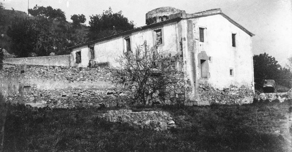 Vista general de Can Minguet. Jordi Audet i Viñals (1926-12)